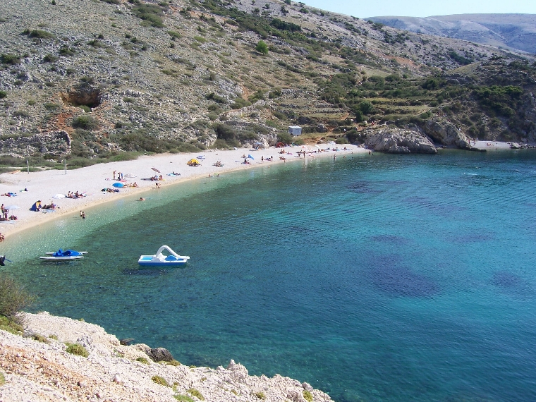 Spiaggia di Stara Baska sull'isola di Krk